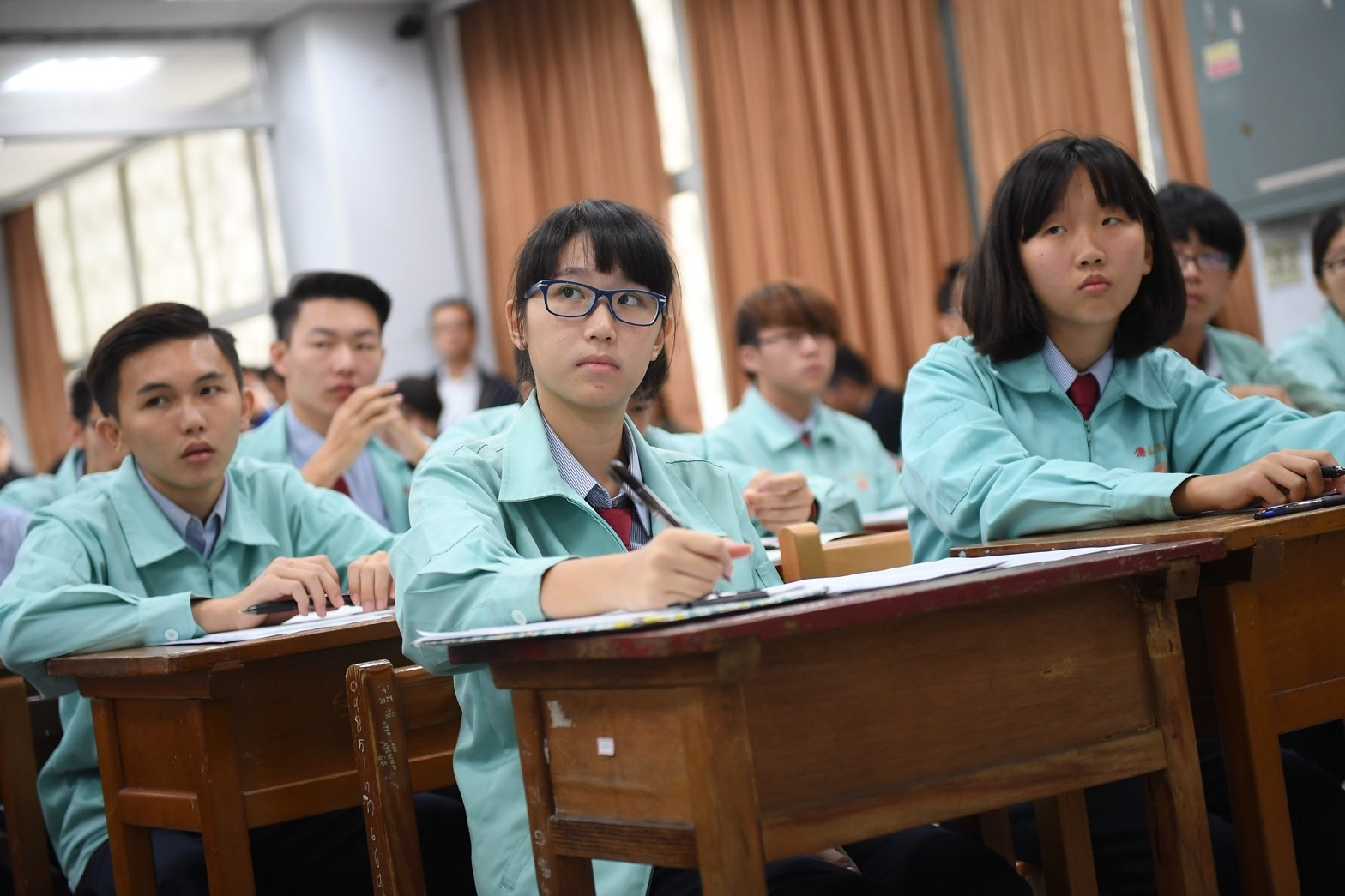 12.23 「國立臺中高級工業職業學校」學生認真聽總統的講解